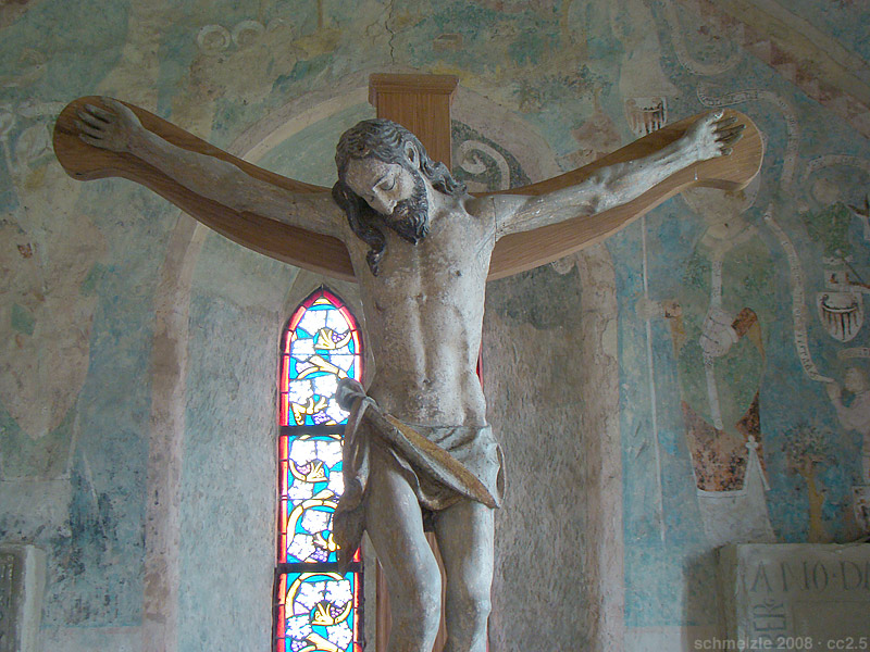 Kruzifix der Bergkirche in Heinsheim.